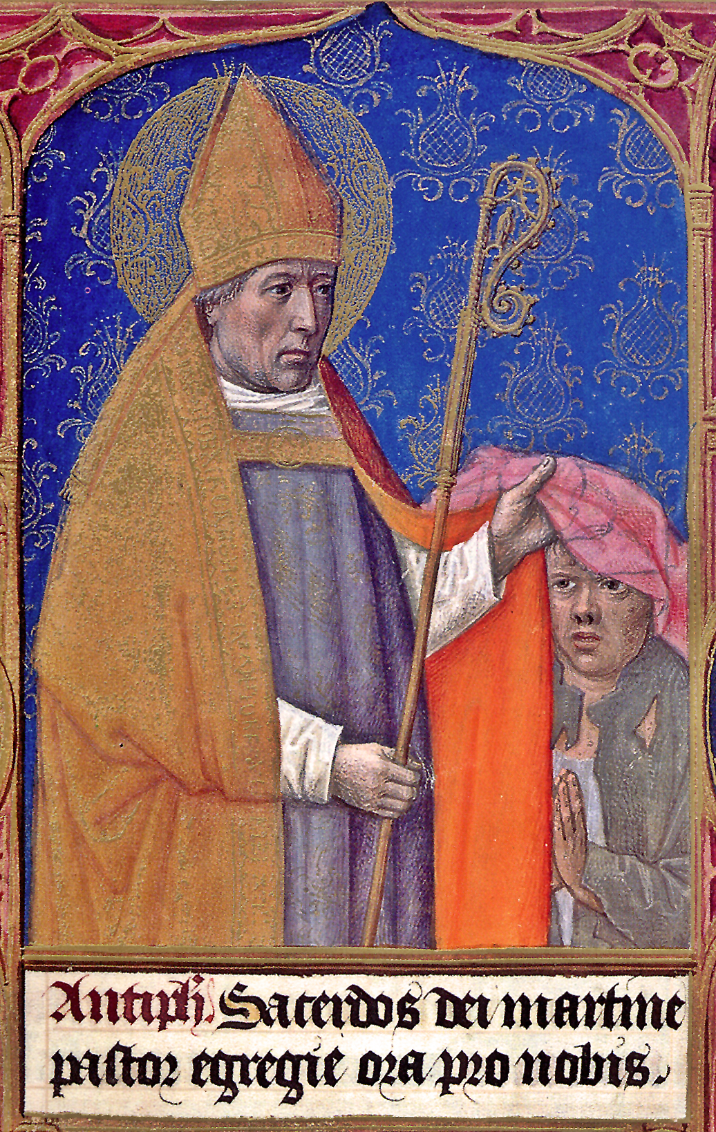 Libro de horas de Juana I de Castilla